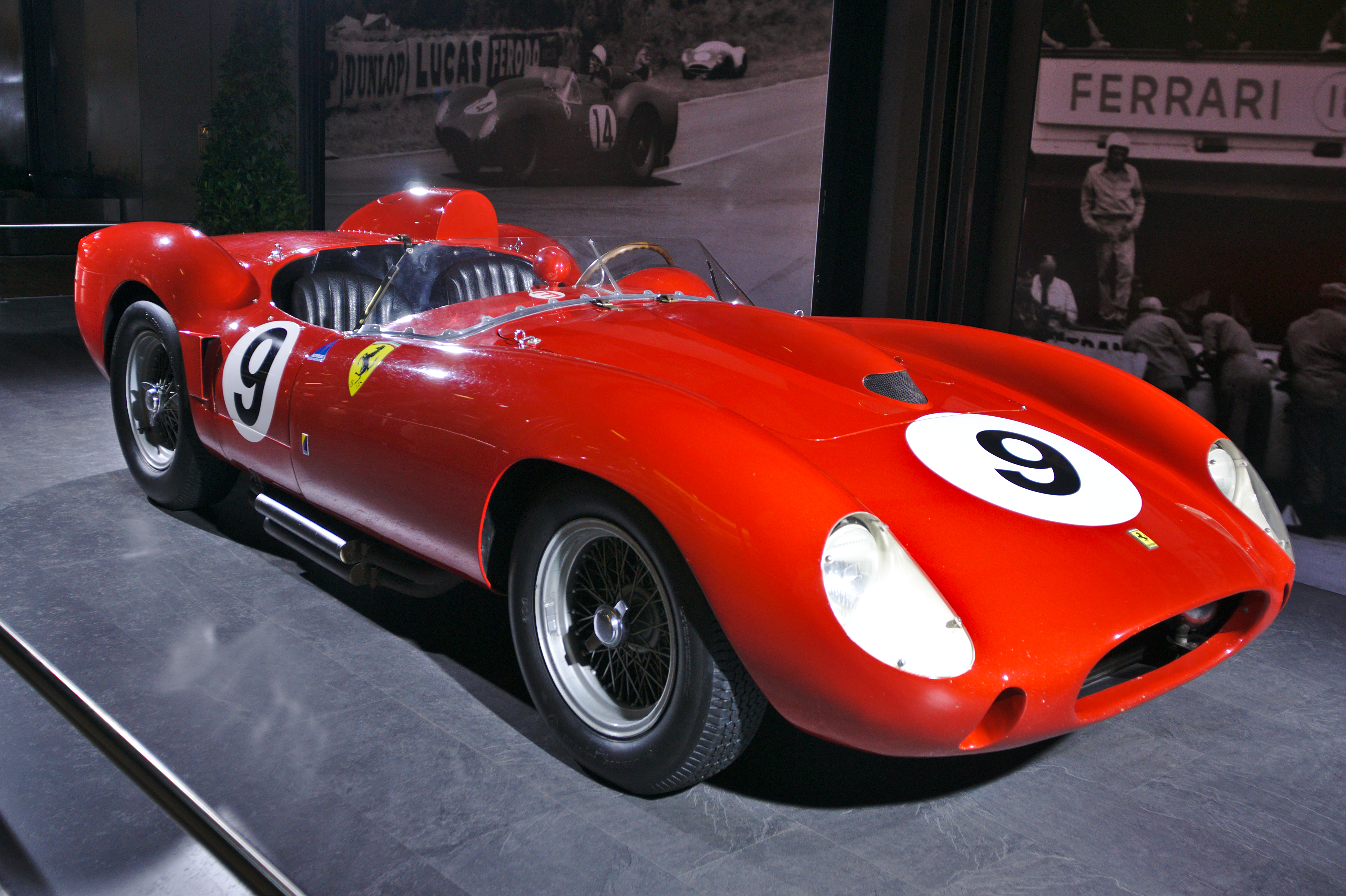 Salon de l'auto de Genève 2014 - 20140305 - Expo Le Mans